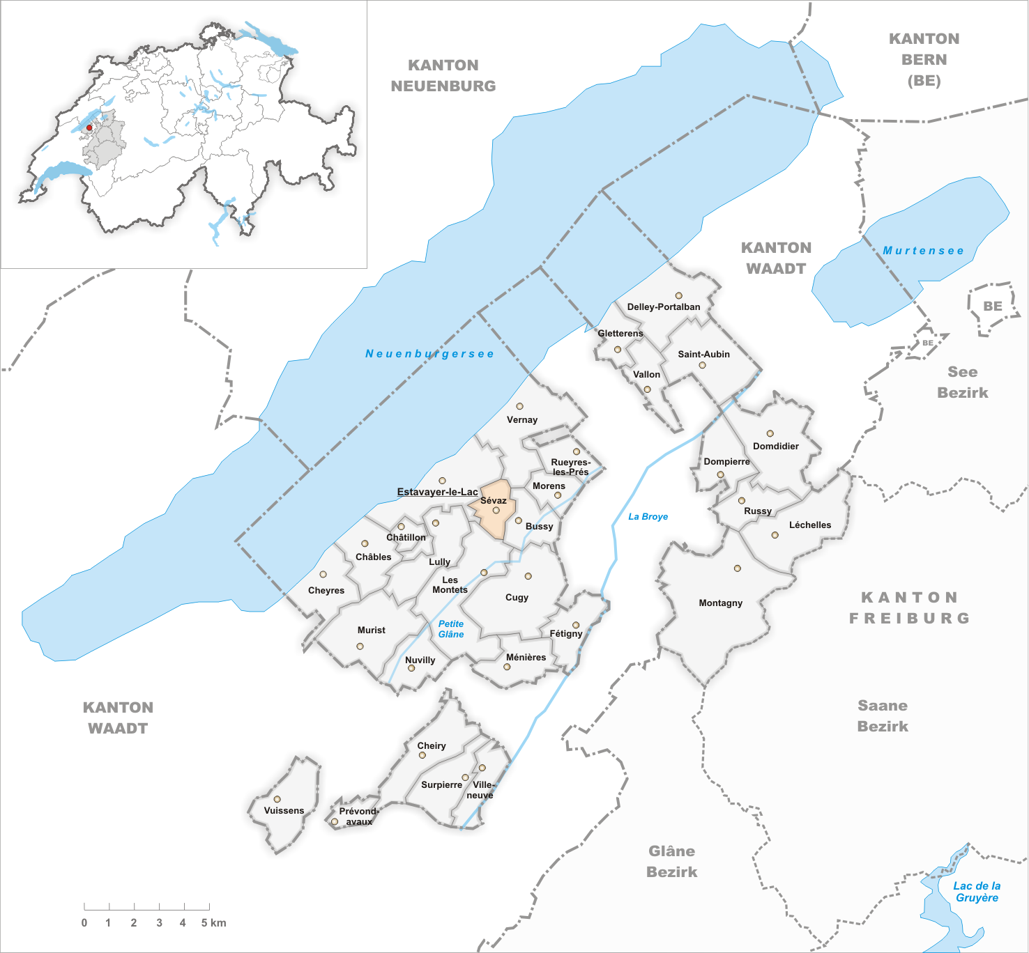 Municipality Sévaz